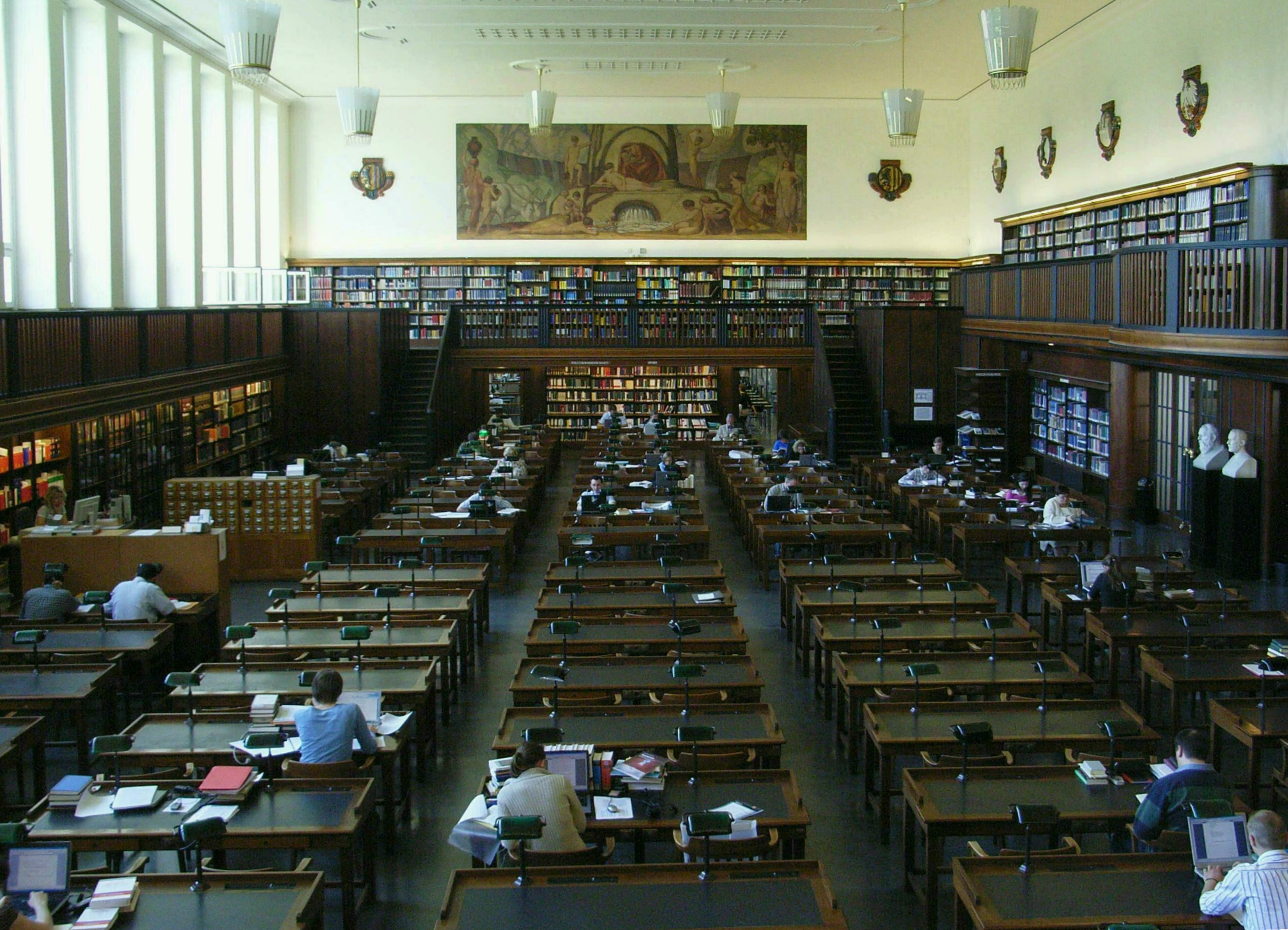 Dieses Bild zeigt den Lesesaal der Deutschen Bücherei in Leipzig.